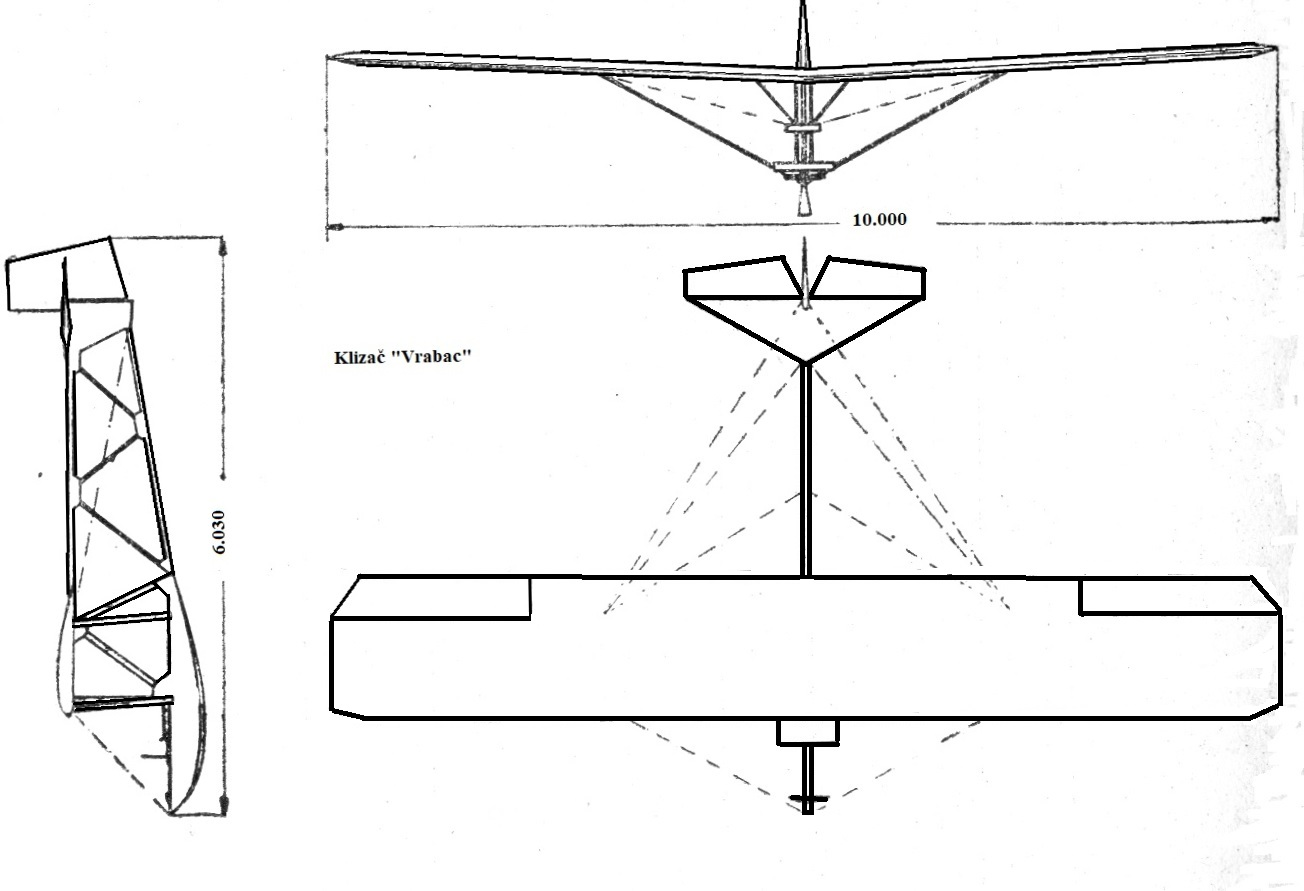 Шоштарићев Врабац клизач за почетну обуку једриличара